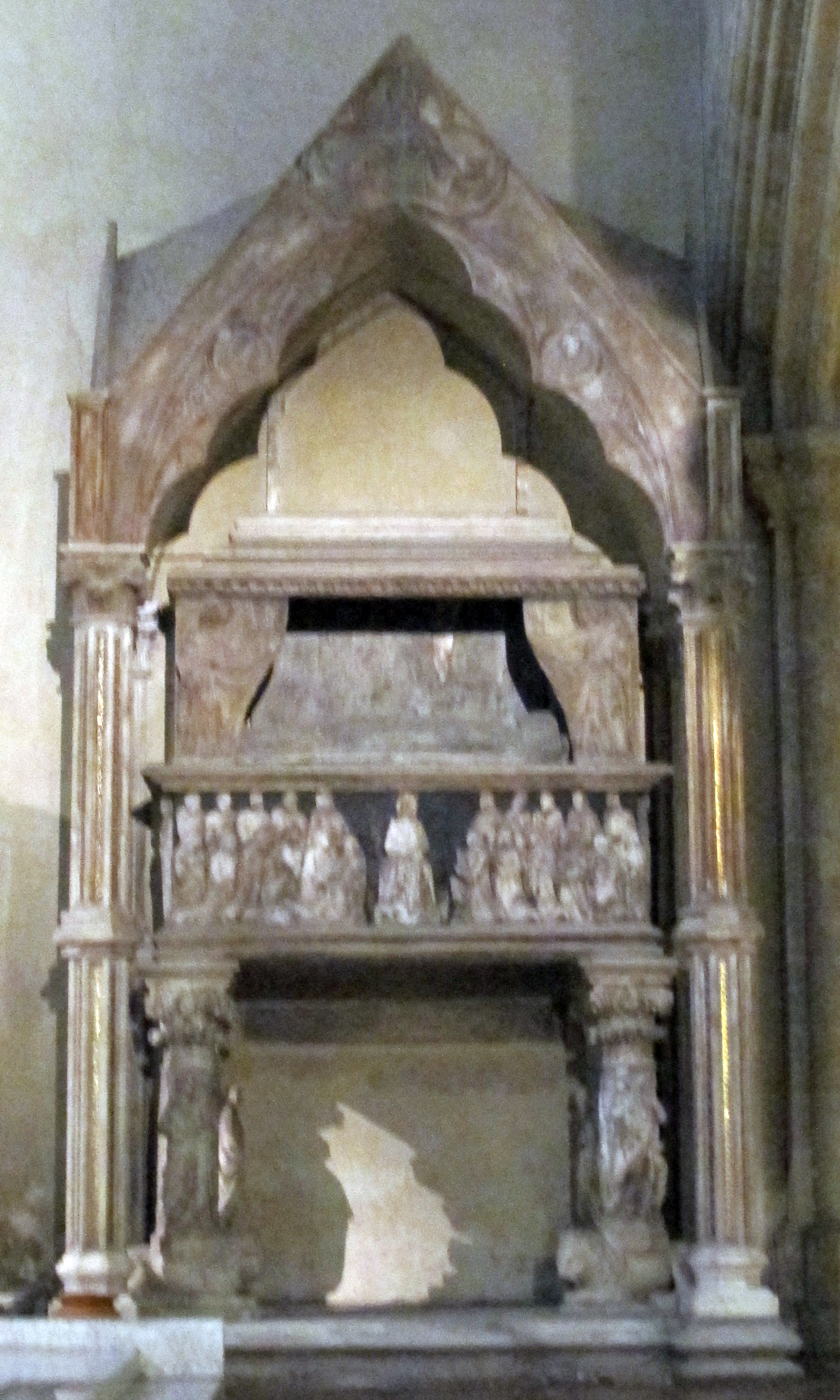 Santa Chiara, Napoli